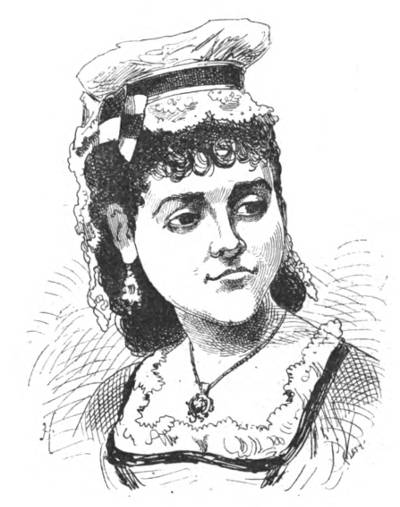 Portrait satirique de Paola Marié.